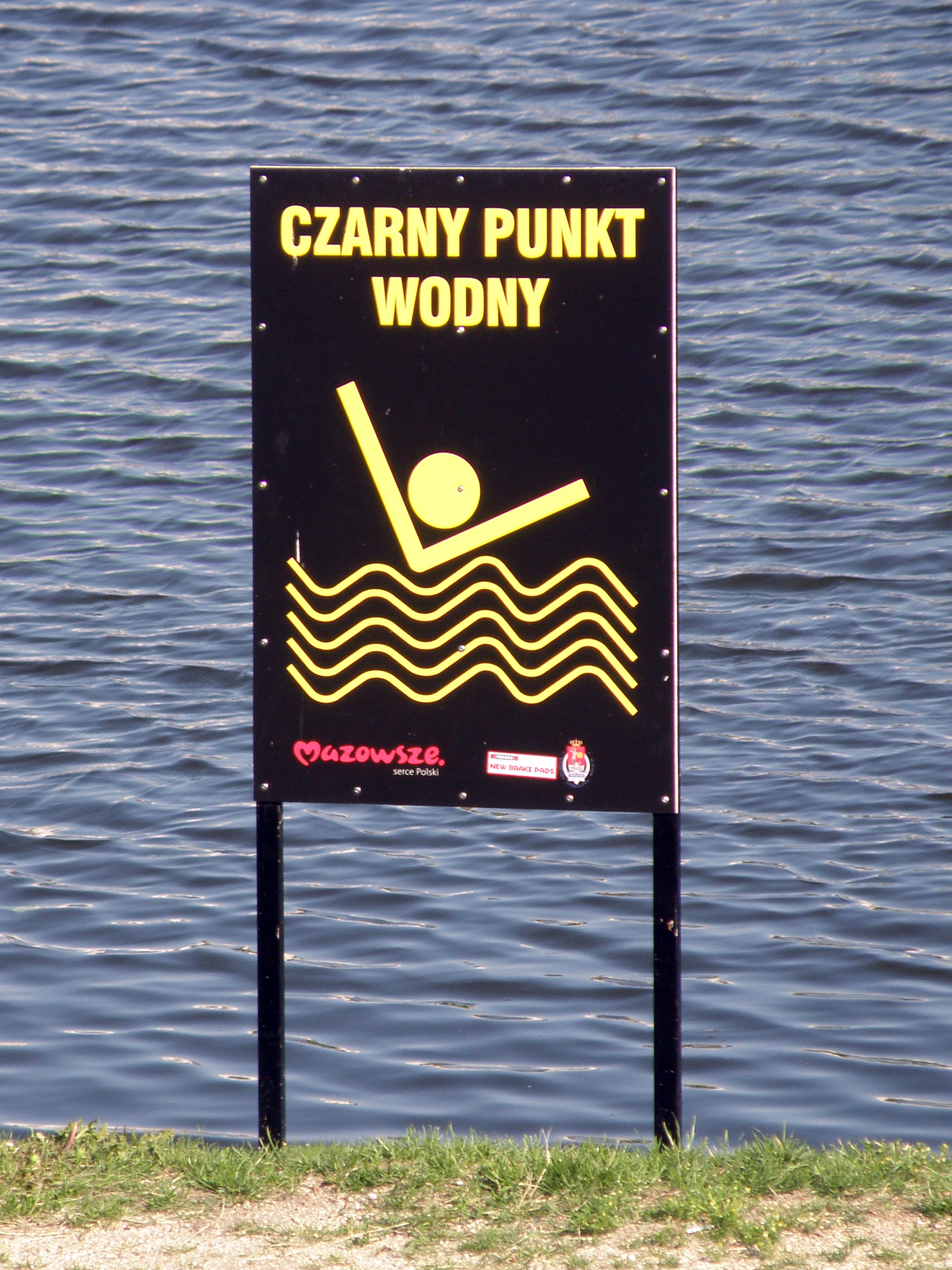 Park Nad Balatonem - Warszawa, Gocław